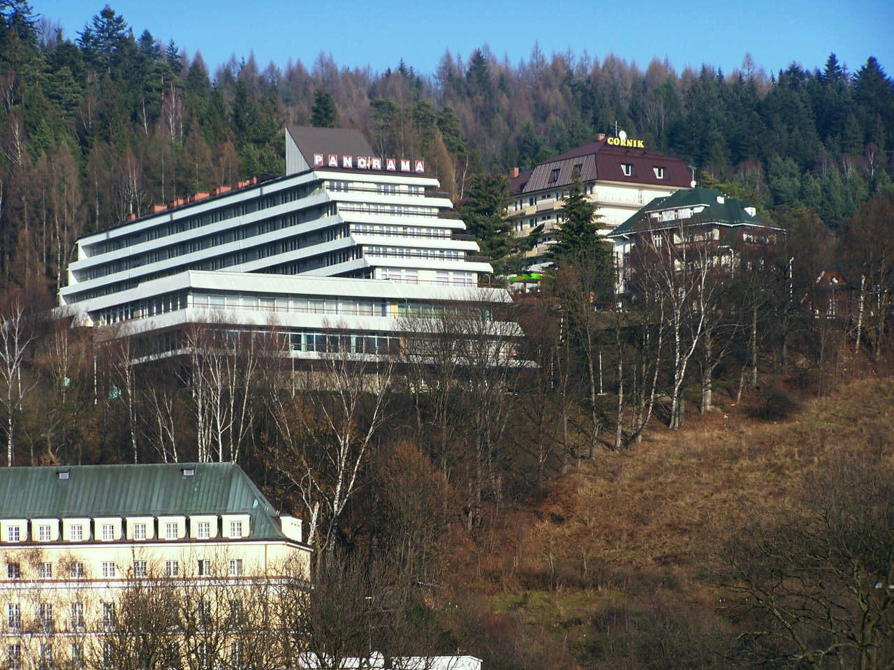 Sanatorium Panorama (Krynica-Zdrój)